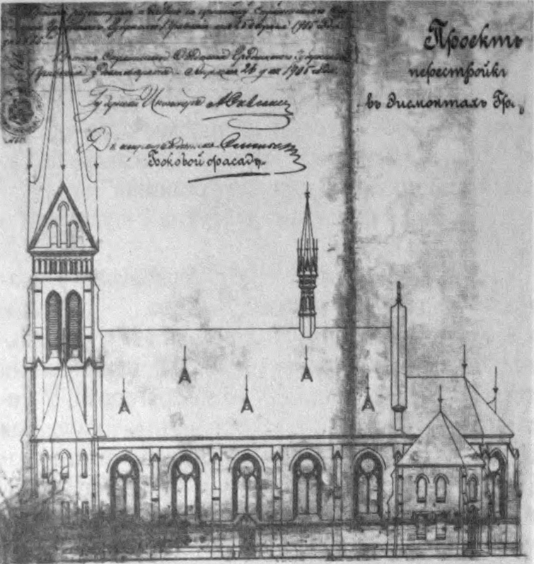 Беларуская (тарашкевіца): Вялікія Эйсманты (Vialikija Ejsmanty). Касьцёл, нерэалізаваны праект